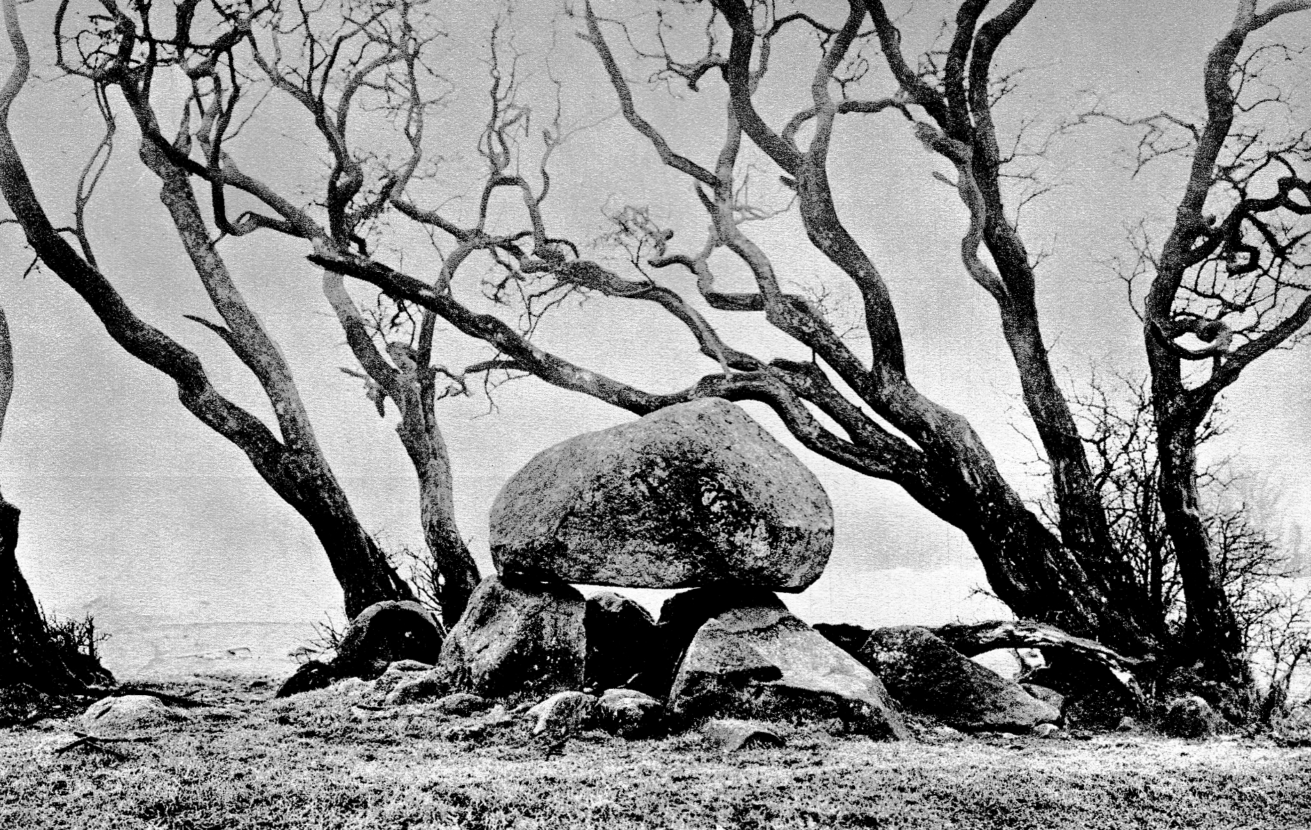 Großsteingrab Poppostein